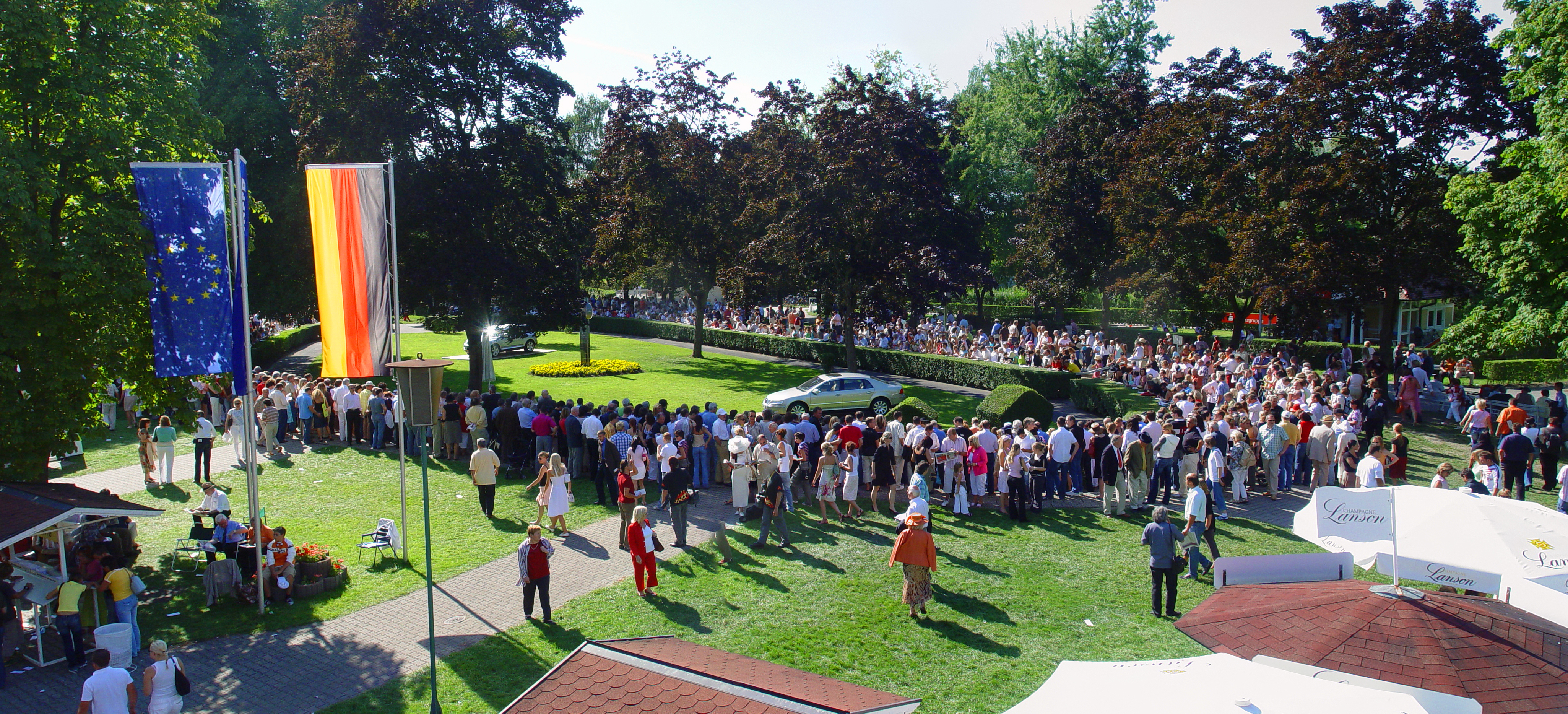 Der Führring des Iffezheimer Rennplatzes aus Sicht der Tribüne, noch ohne Pferde.